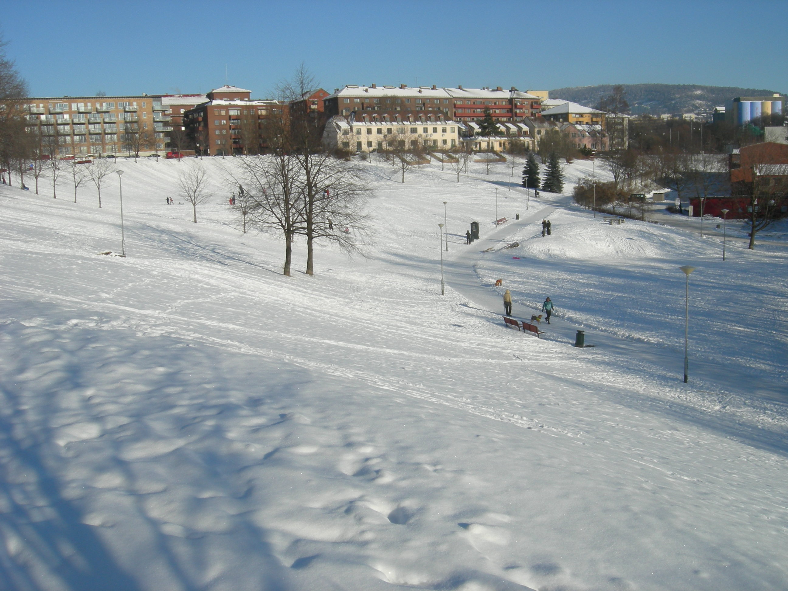 Myraløkka park by Akerselva, Sagene, Oslo, Norway